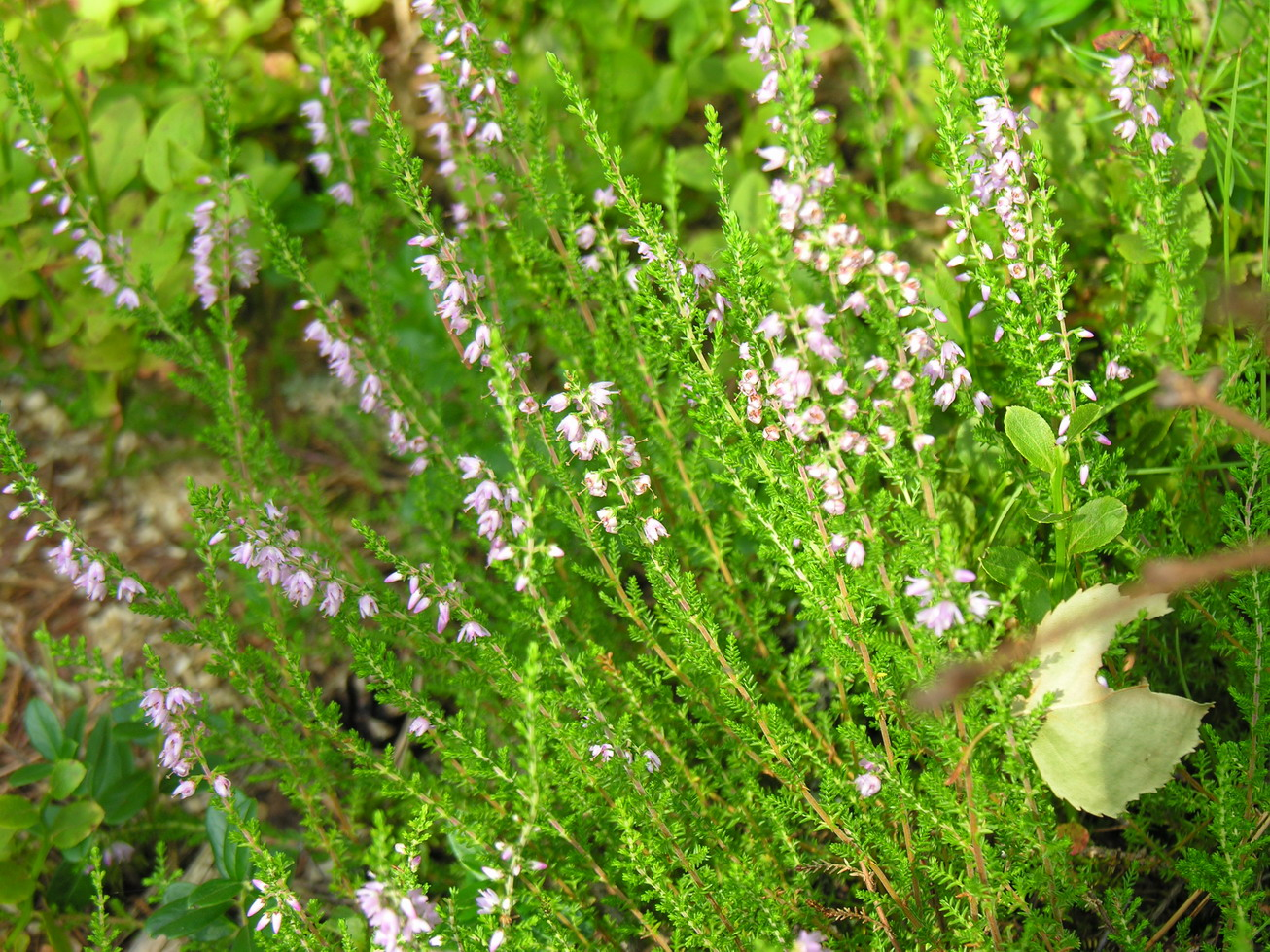 Šilinis viržis (Calluna vulgaris) Fam. Erikiniai (Ericaceae) Foto: Algirdas, 2005 m.